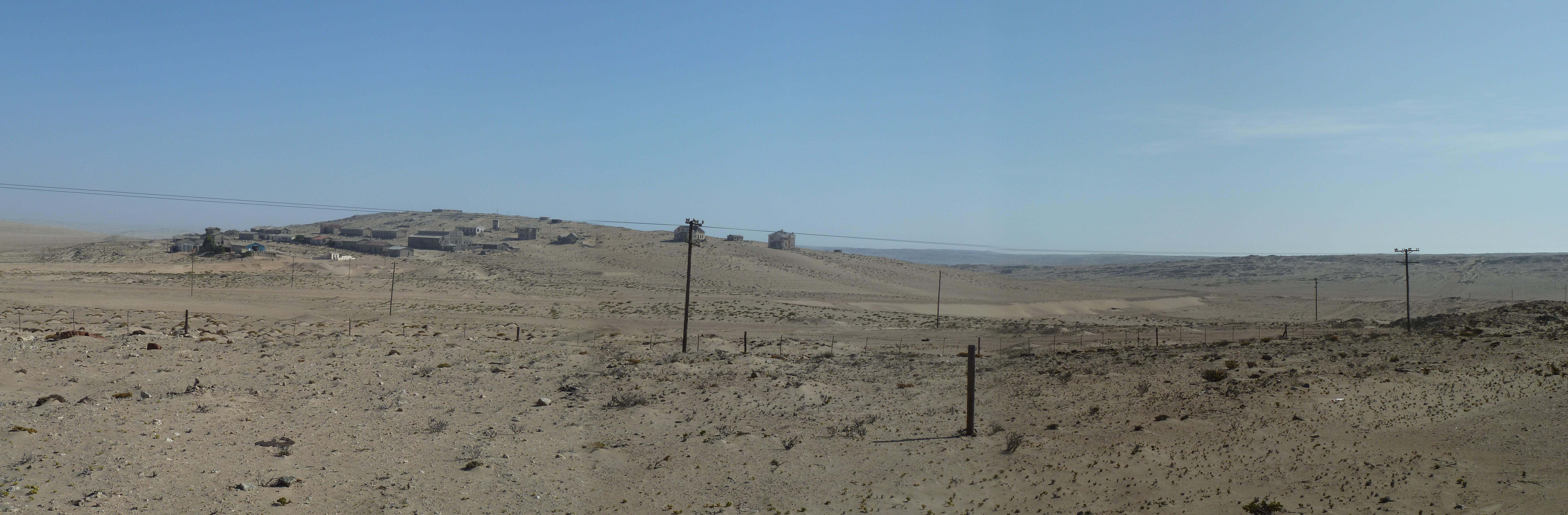 Panorama nahe Kolmanskuppe bei Lüderitz, Namibia